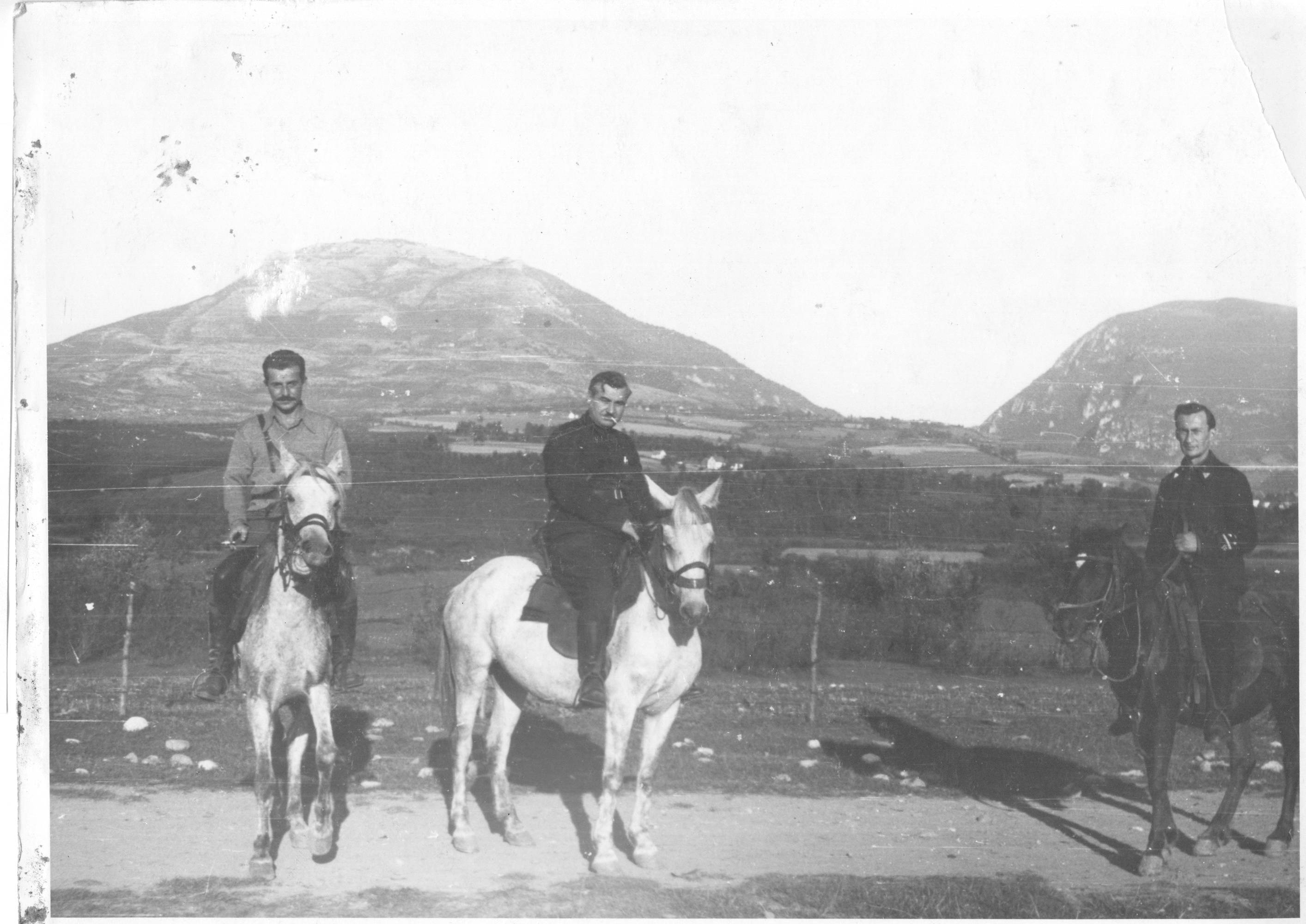 Srpskohrvatski / српскохрватски: Filozof Koča Popović, komandant I proleterske divizije, i fizičar Pavle Savić u oslobođenom Bugojnu oktobra 1943. U sredini "Viktor" - Bugarin.